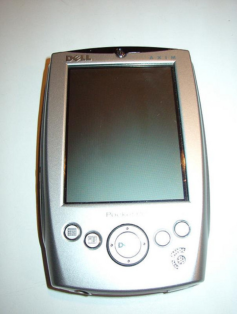 Dell Axim X5